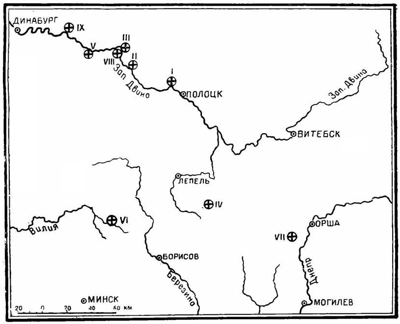 Рис. 1. Карта древних камней с надписями. I - Борисов камень у Полоцка; II - Борисов камень у д. Наковники; III - Борисов камень у д. Болотки; IV - Борисов камень у с. В. Городец; V - Борисов камень у г. Друя; VI - Борисов камень у д. Каменки; VII - Рогволодов камень; VIII - «Сулиборь хрьсть»; IX - камень «Святополк-Александр», уничтоженный в 1818 г.